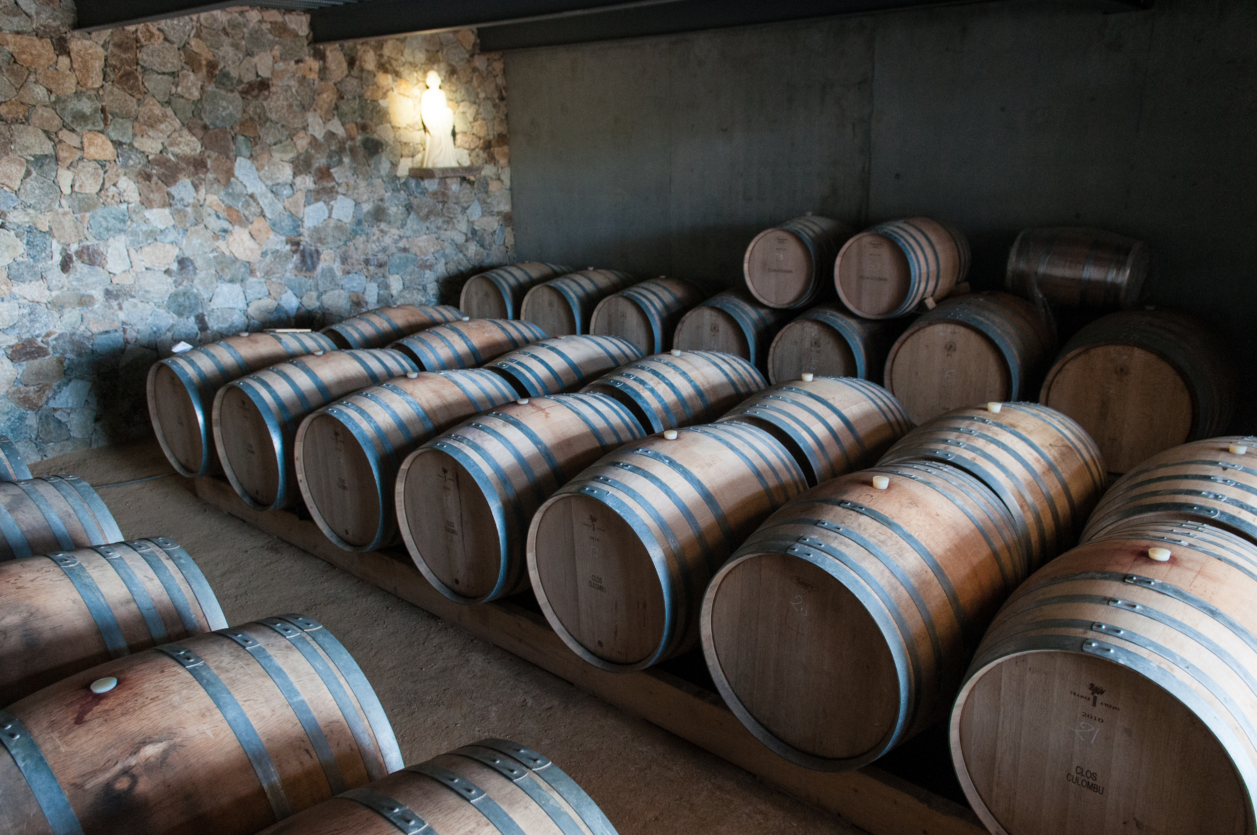 Clos Culombu, Corsica